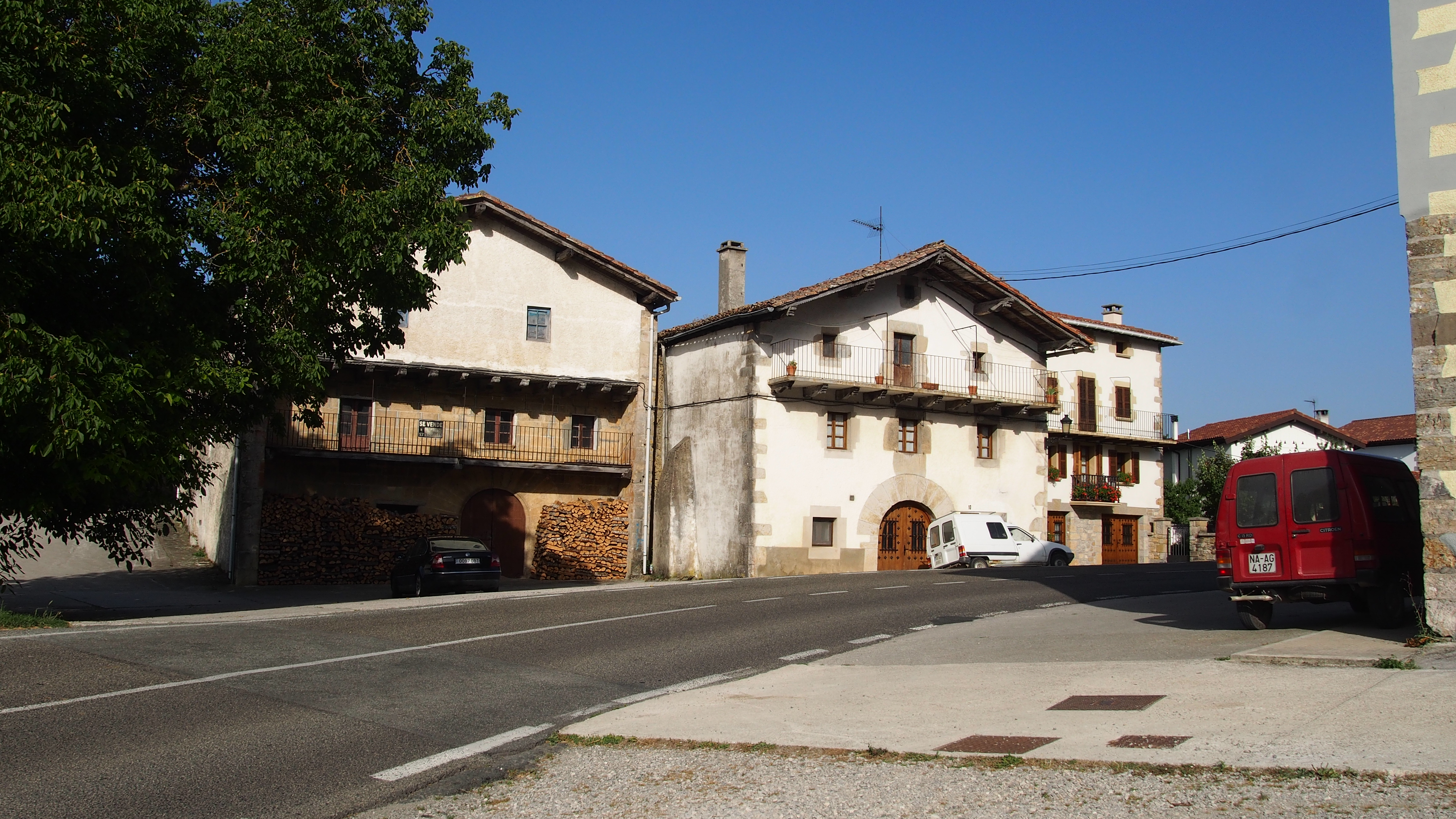 Hiru etxeen ikuspegia errepidetik.